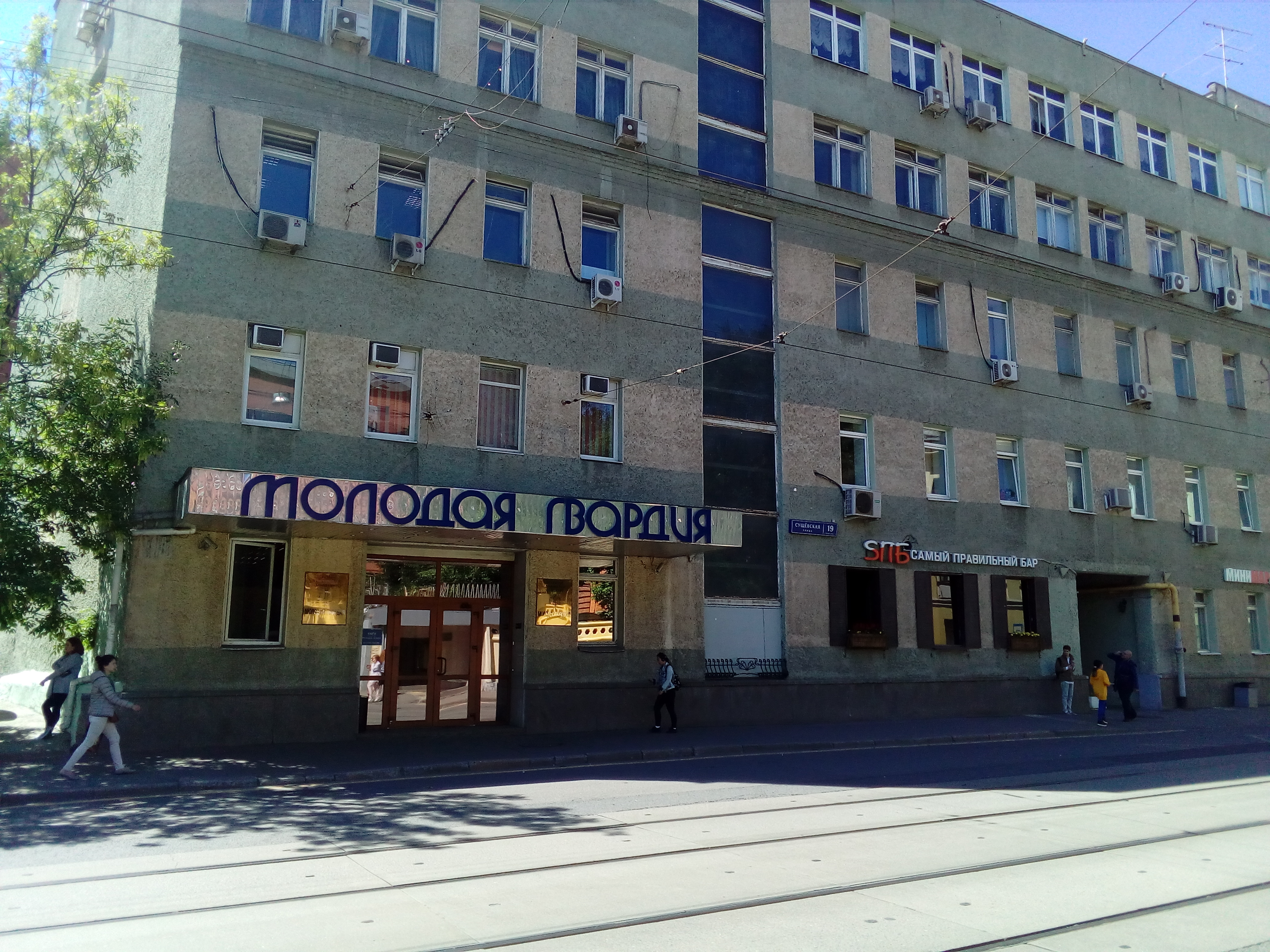 Здание издательства "Молодая гвардия" на Сущёвской улице. Москва, 15 июня 2018г.